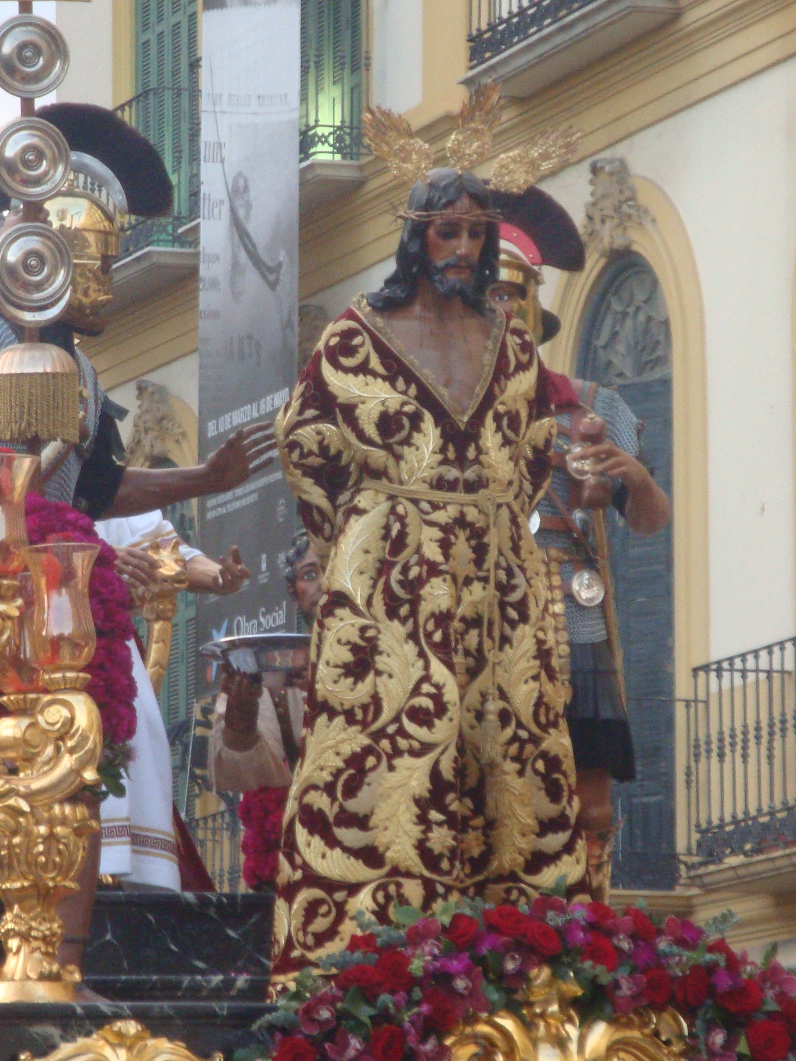 2010 Holy Week in Málaga